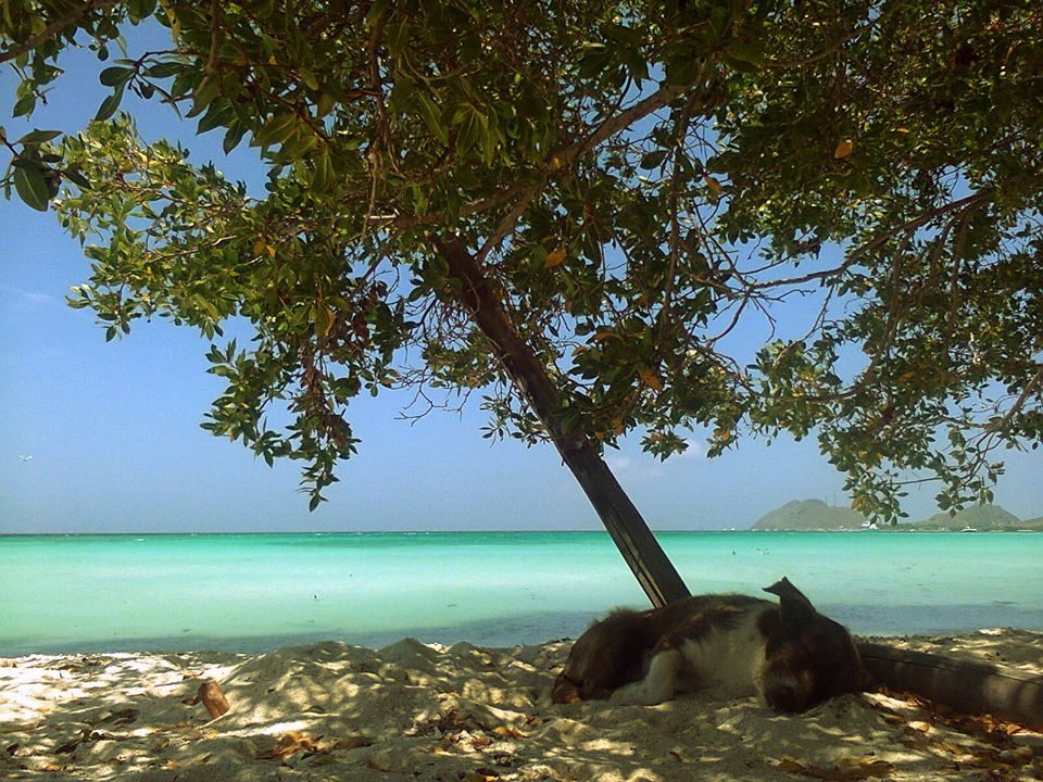 Cayo Madrisquí, con el Gran Roque de fondo, Los Roques, Dependencias Federales, Venezuela